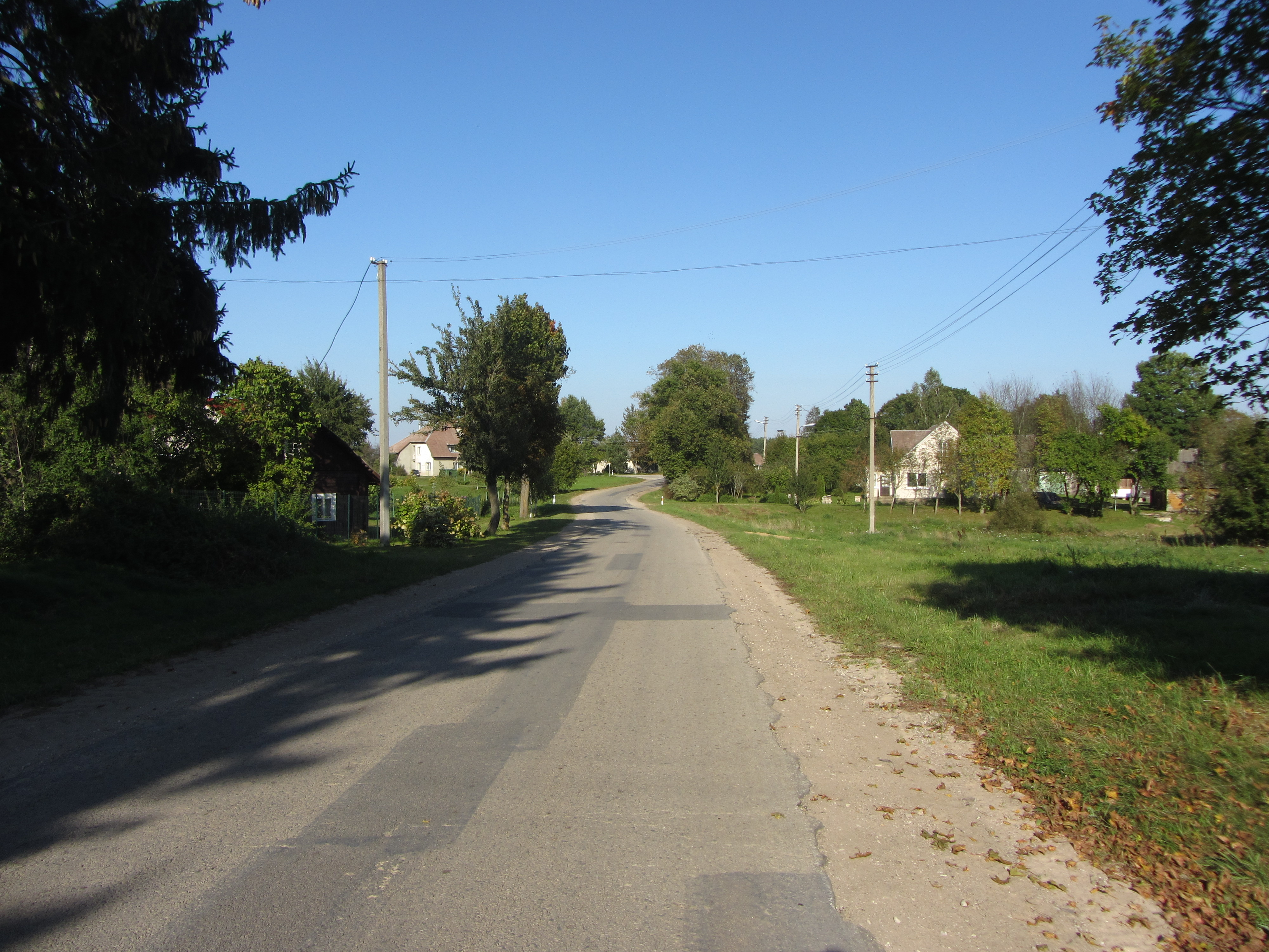 Tolkūnai 65387, Lithuania